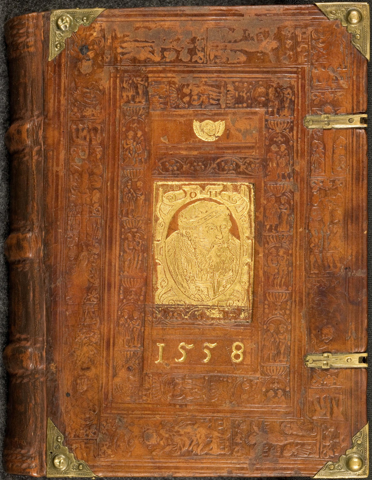 Codex Palatinus germanicus 13, Einband ("Ottheinrich-Einband"), Vorderdeckel: vergoldete Platte mit Bildnis Ottheinrichs, des Pfalzgrafen bei Rhein. Inschrift oben: O. H. (Ottheinrich); Inschrift unten: P. C. (Pfalzgraf, Churfürst); oberhalb: vergoldeter Engelskopf; unterhalb: Jahreszahl 1558